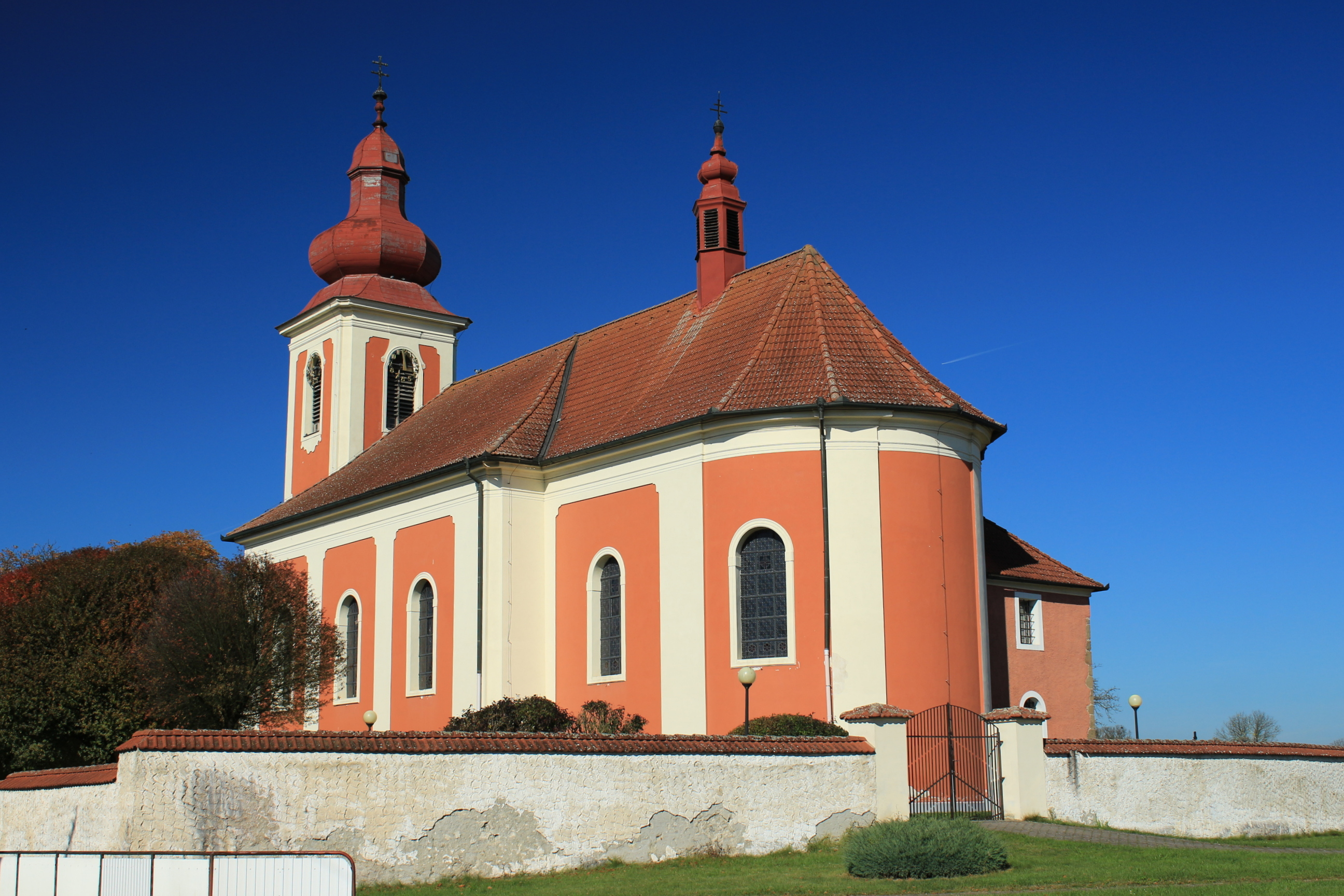 Kostel Nejsvětější Trojice v Malšicích